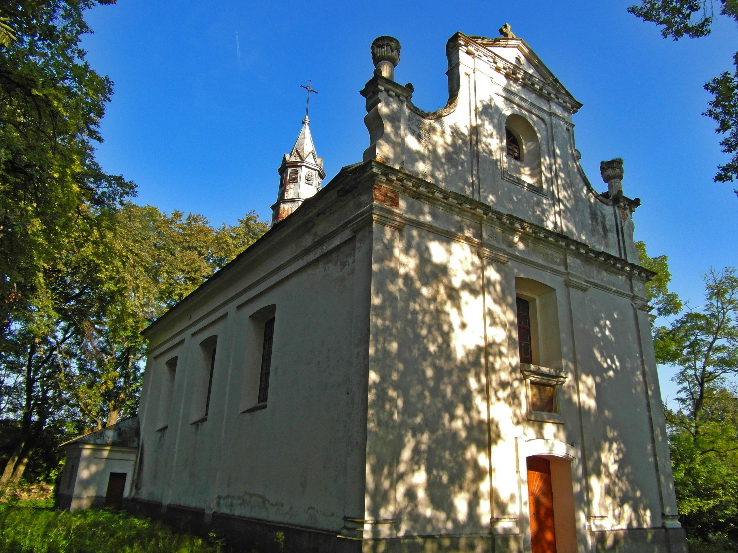 Костел Св.Станіслава(мур.), Тарноруда